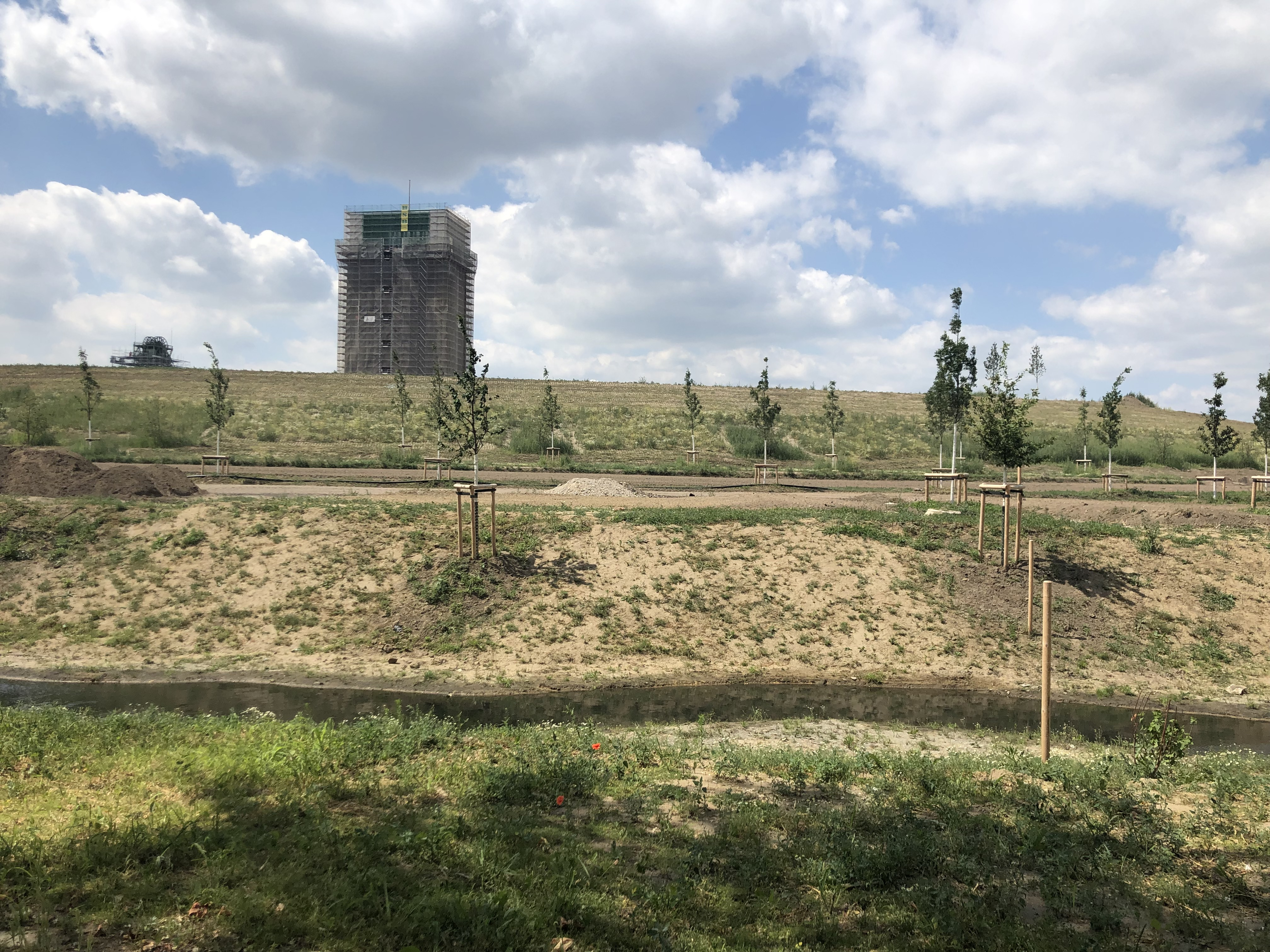 Übersicht über das LAGA Gelände 2020.